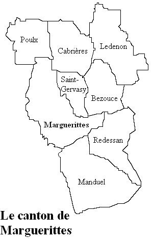 Le canton de Marguerittes image personnelle